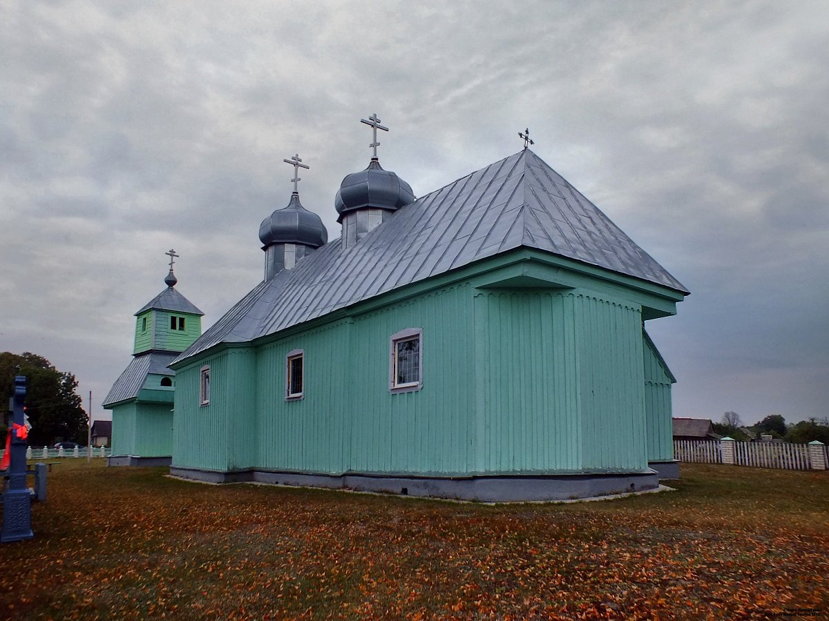 Чэрск. Свята-Міхайлаўская царква